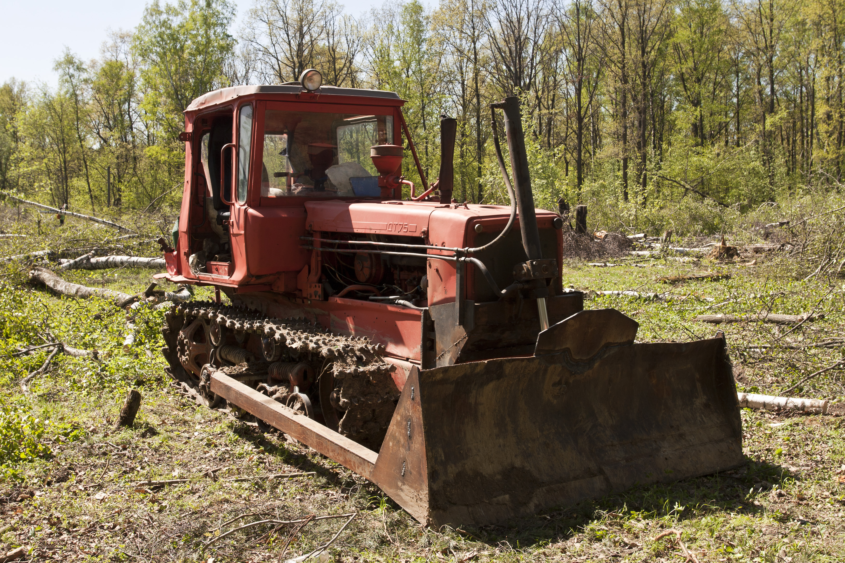 DT-75 bulldozer in Khimki Forest